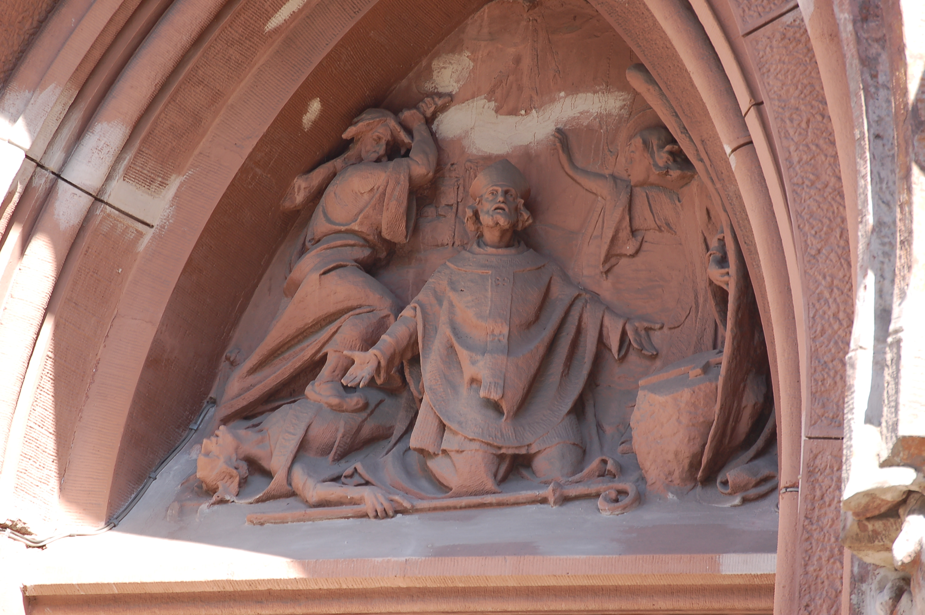 Костьол св. Миколая у Києві (Червоноармійська вулиця, 75)